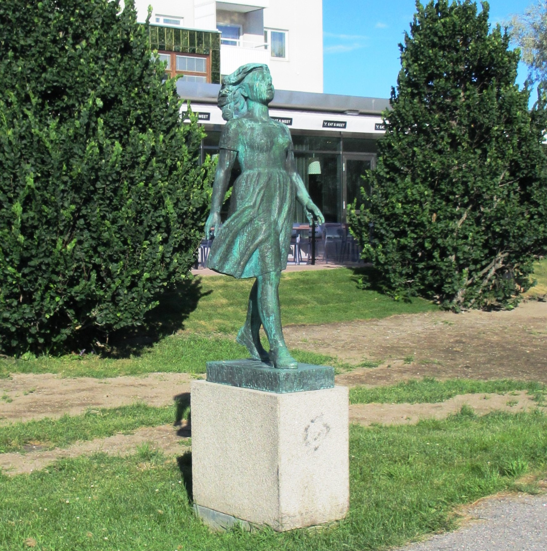 Maj, skulptur av Emil Näsvall, Strykjärnsparken, Söderhamn (1952)